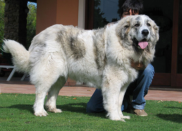 Mastín del Pirineo «Murtoi`s Lula» (bitch), Photo by Milena Mura, Spain